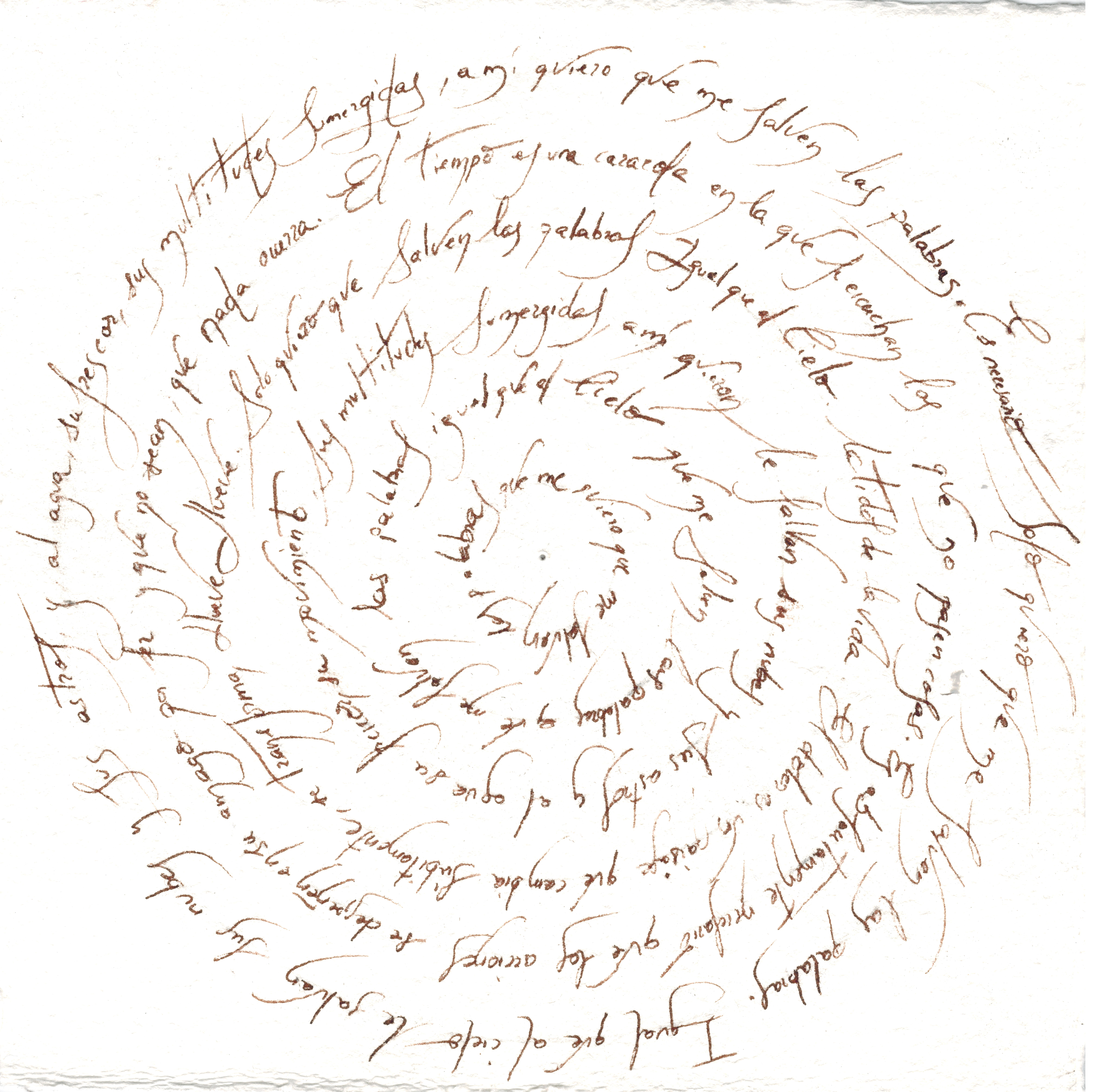 Caligrafía